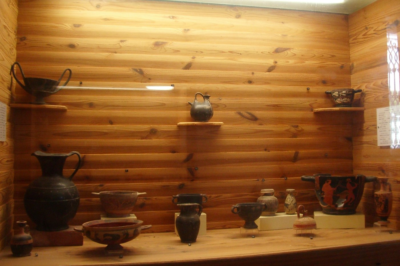 casa antiga al Bardo